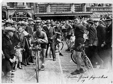 Bicycle, Velo, Fahrrad, Radrennen. Paris-Rubaix, 1900